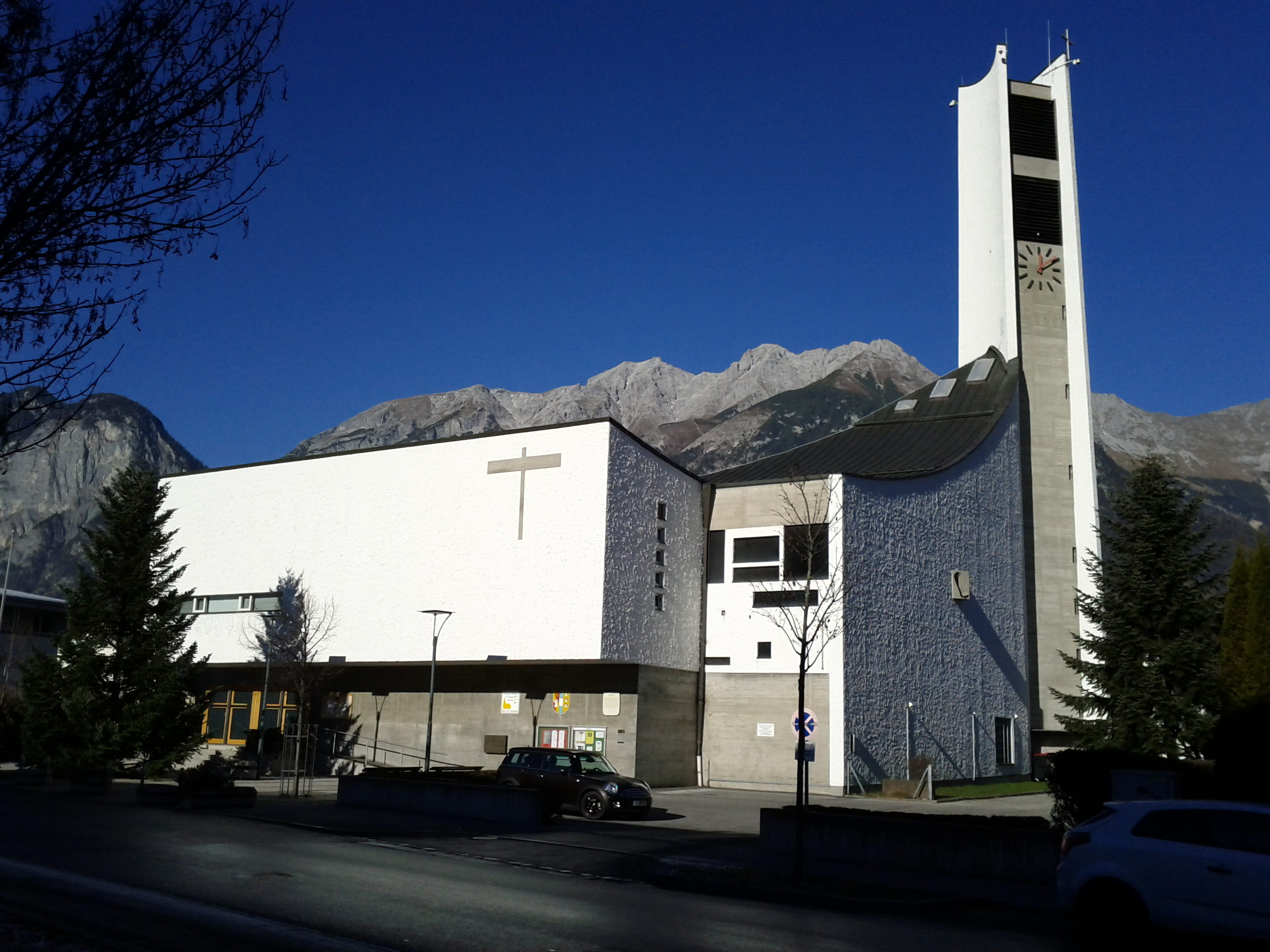 Katholische Pfarrkirche Maria am Gestade - Wilten, Weingartnerstraße 23 This media shows the remarkable cultural object in the Austrian state of Tyrol listed by the Tyrolean Art Cadastre with the ID 69292. (on tirisMaps, pdf, more images on Commons, Wikidata)